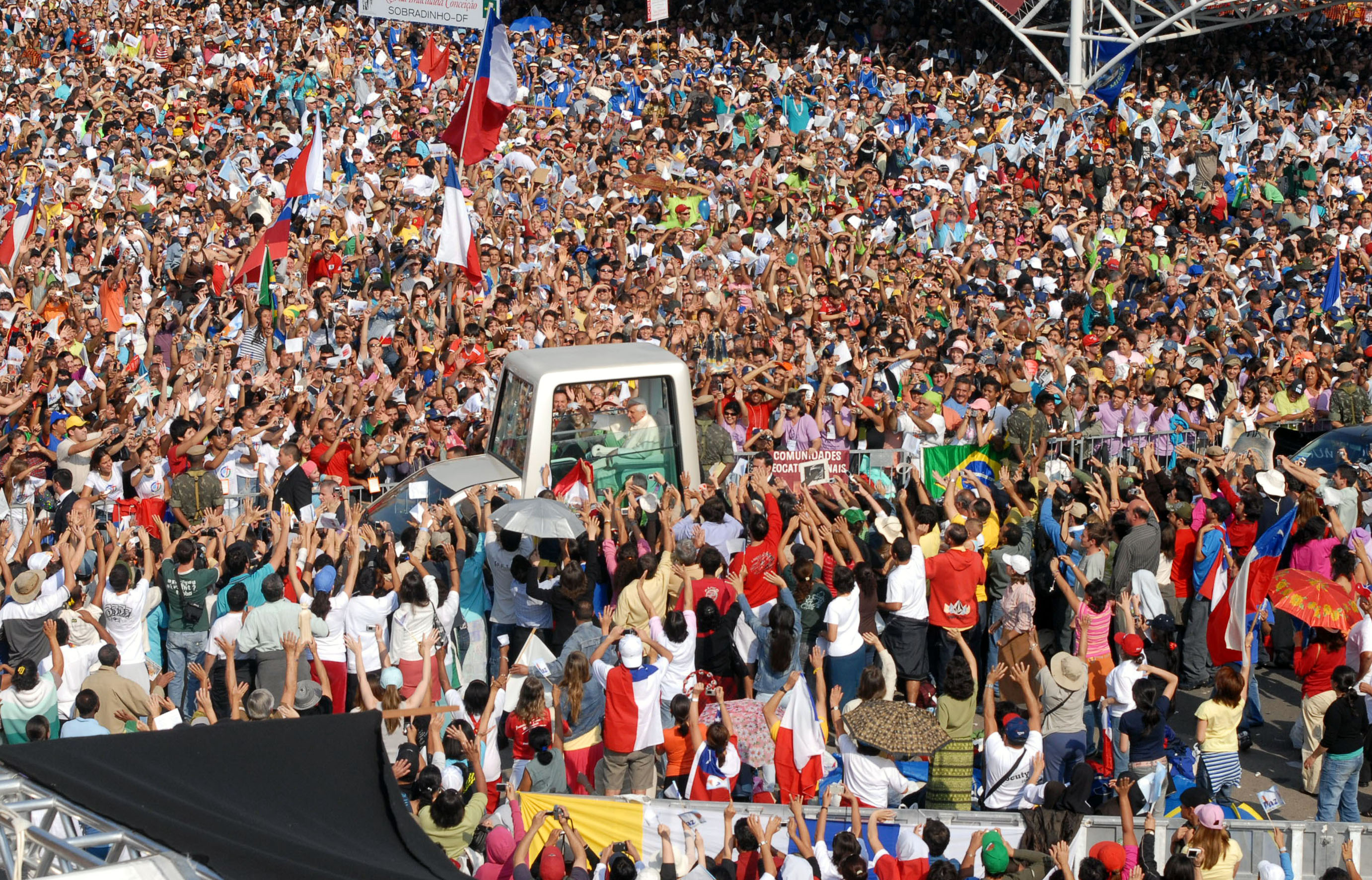 Papa Bento XVI durante missa na Basílica de Nossa Senhora Aparecida, no interior do estado de São Paulo, Brasil.